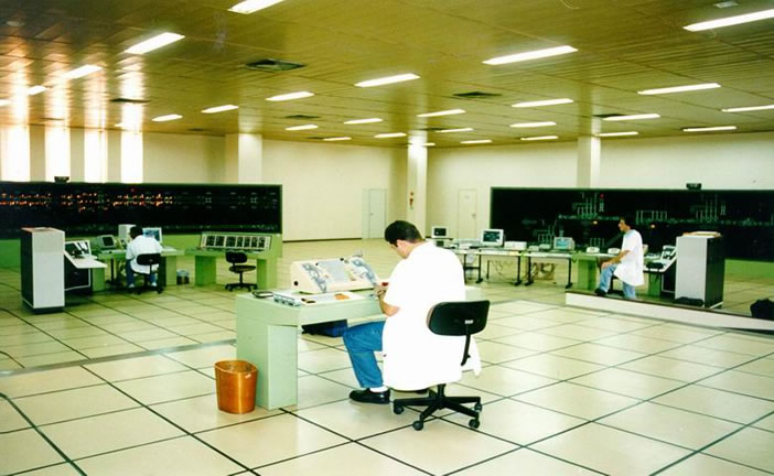 CCO METRO Belo Horizonte, Brasil